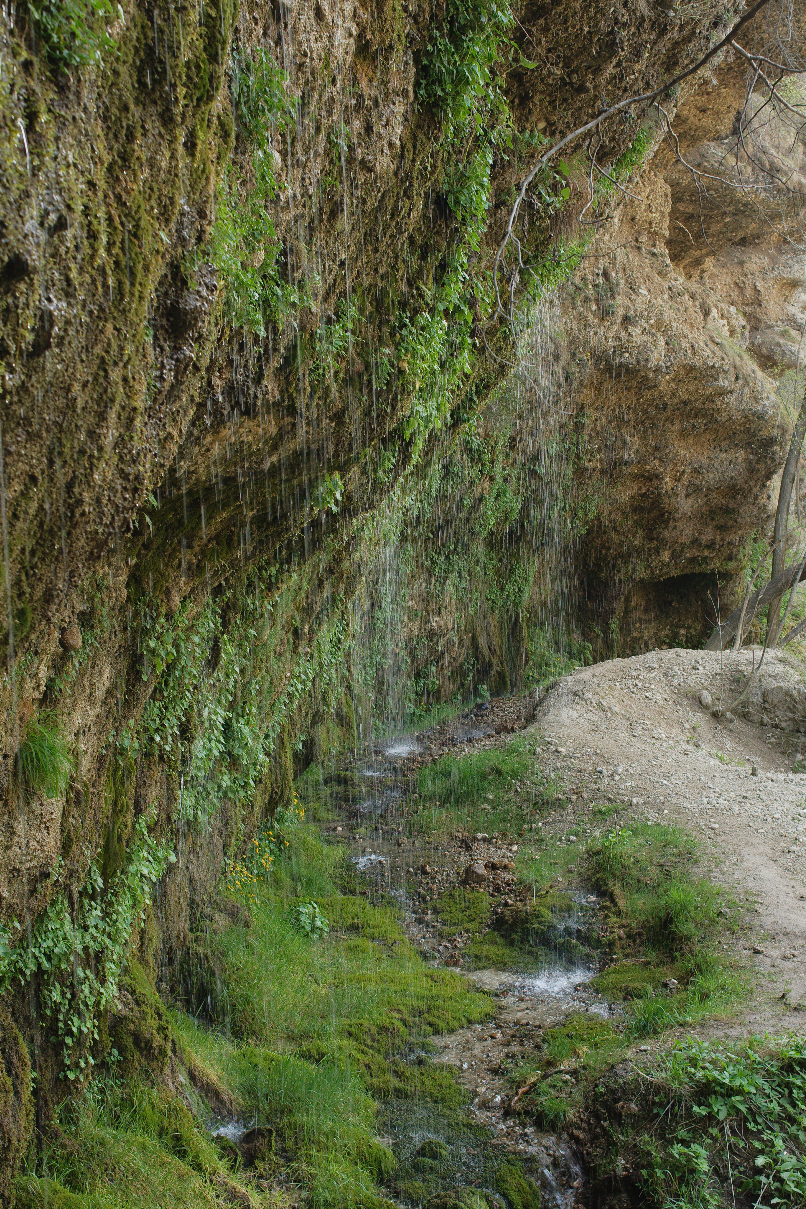 Die Rinnende Mauer in der Steyrschlucht bei Molln This media shows the natural monument in Upper Austria with the ID nd567 (Rinnende Mauer in Molln).